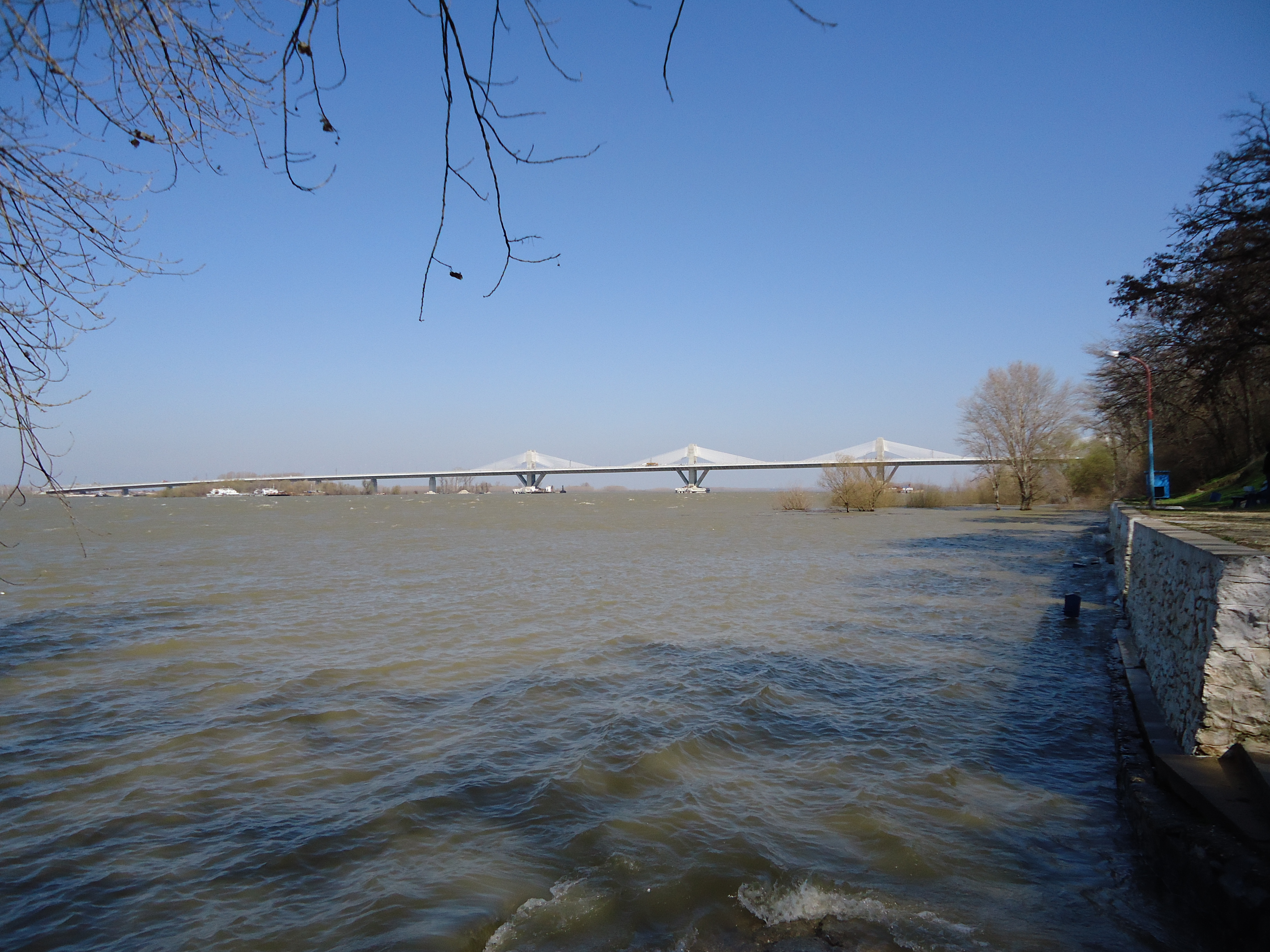 Podul Calafat - Vidin in martie 2013. Poza facuta de pe malul romanesc.